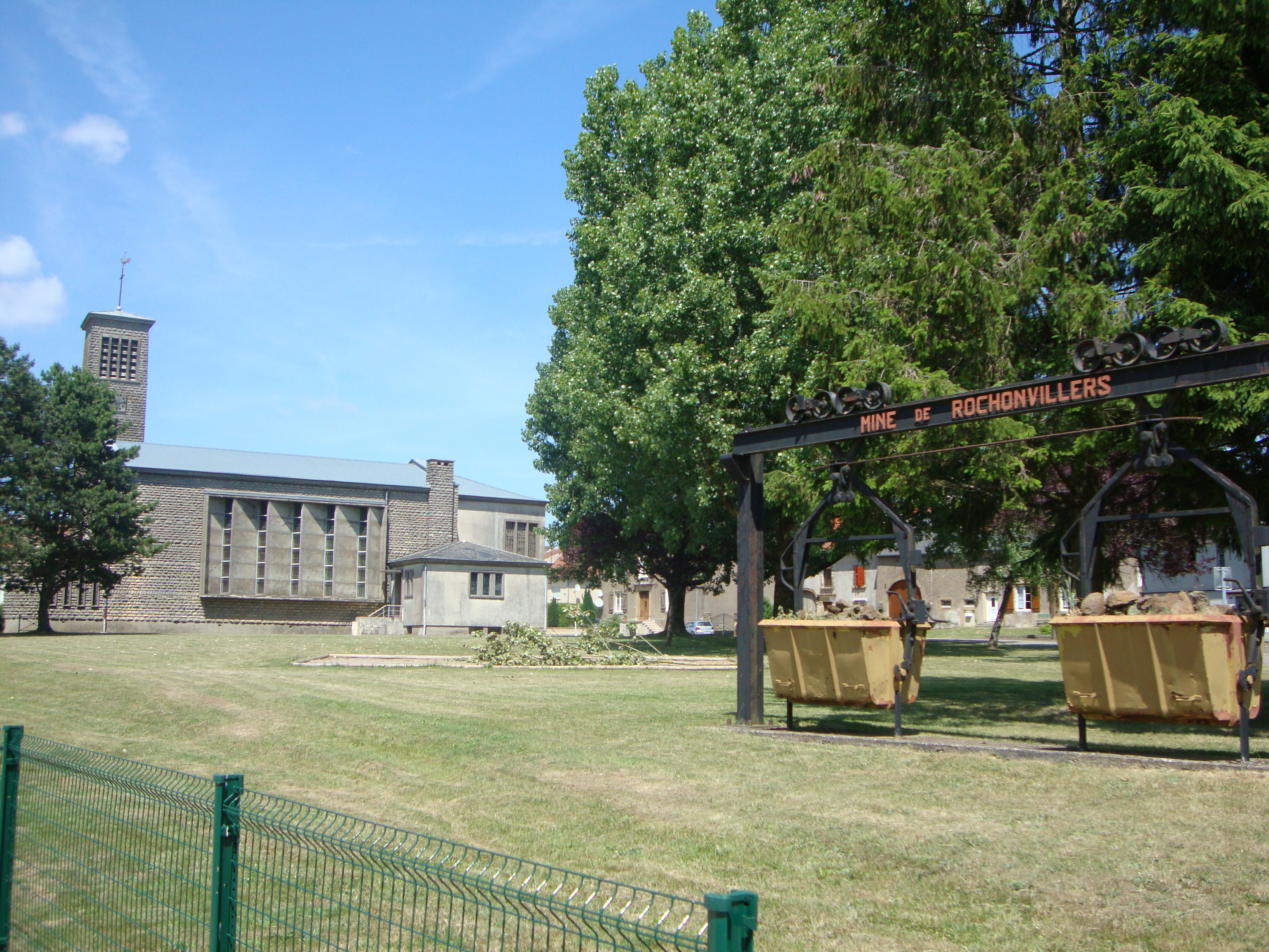 Rochonvillers, Moselle (57)